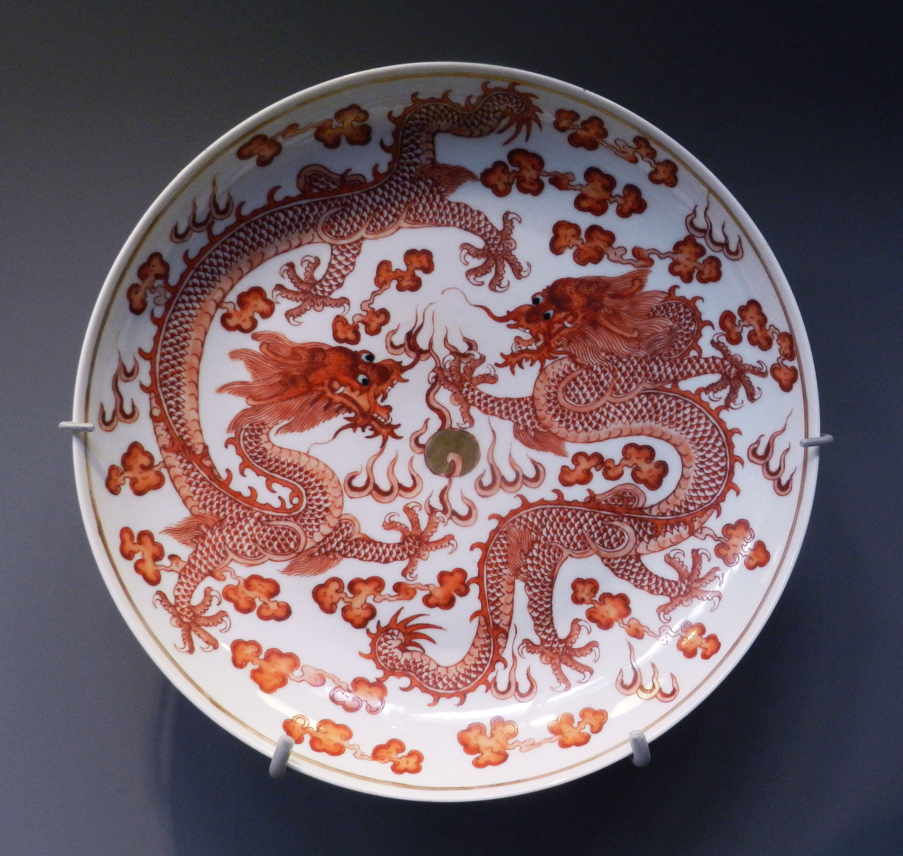 Porcelaine décor d'émaux polychromes sur couverte Chine (Fours de Jingdezhen,Jiangxi) Qing(1644-1911), Régne Guangxu (1875-1908) This is a file created at the museum: Musée royal de Mariemont in Morlanwelz